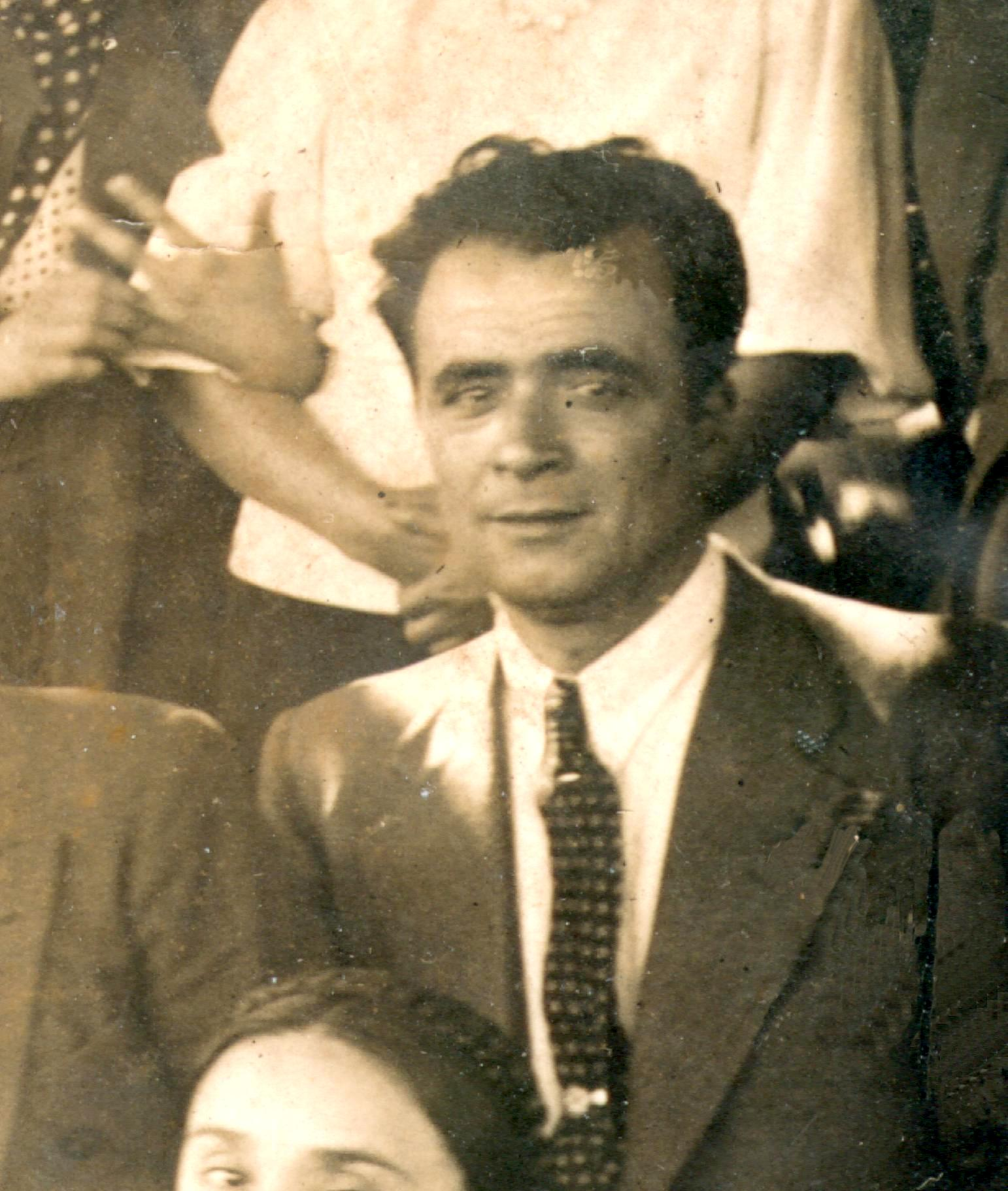 Luis Ibañez Vasquez en la Plaza de San Vicente en 1928